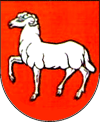 Herb Lasocina, powiat opatowski, woj. świętokrzyskie